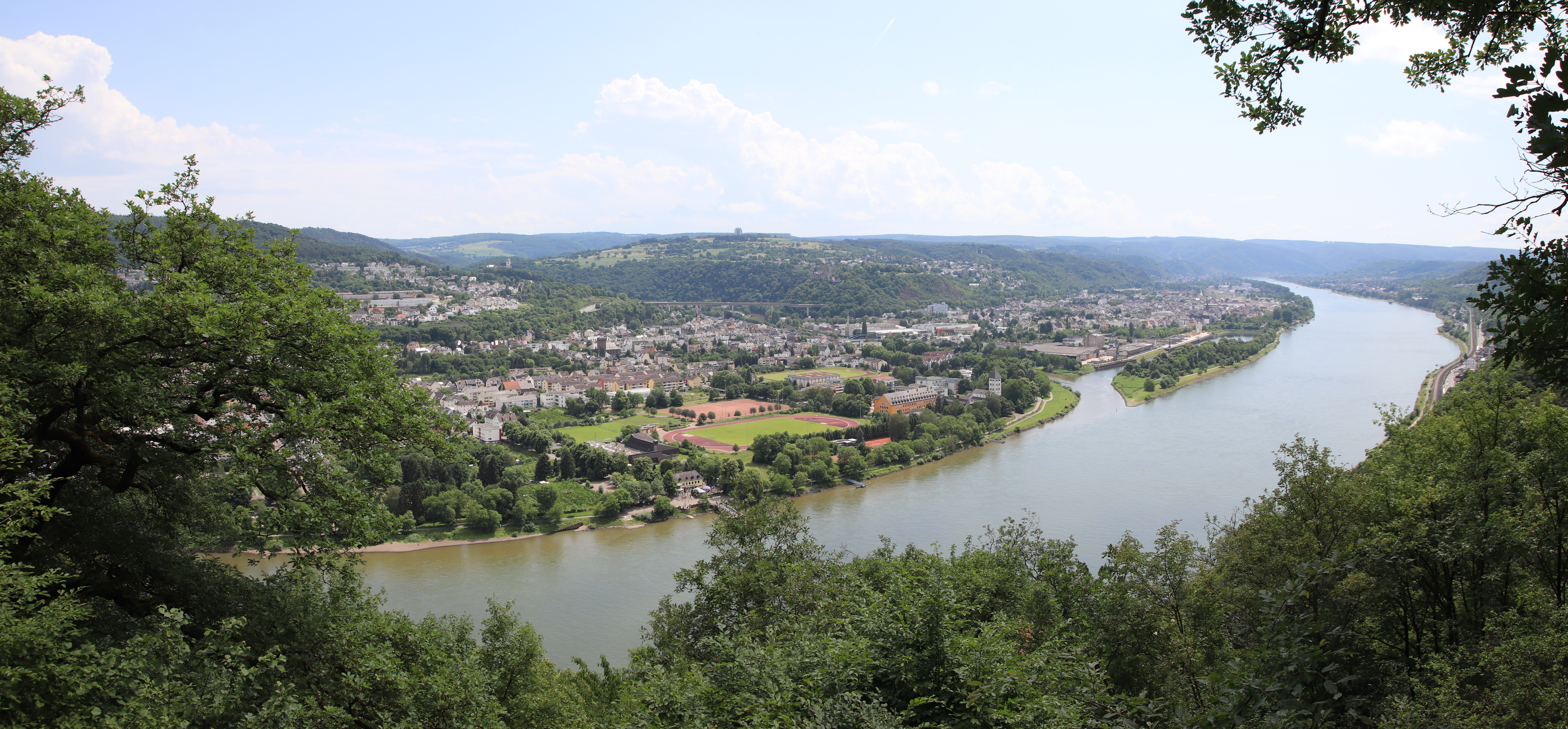 Blick nach Lahnstein von einem Aussichtspunkt des Rheinburgenwegs oberhalb von Schloss Stolzenfels aus.